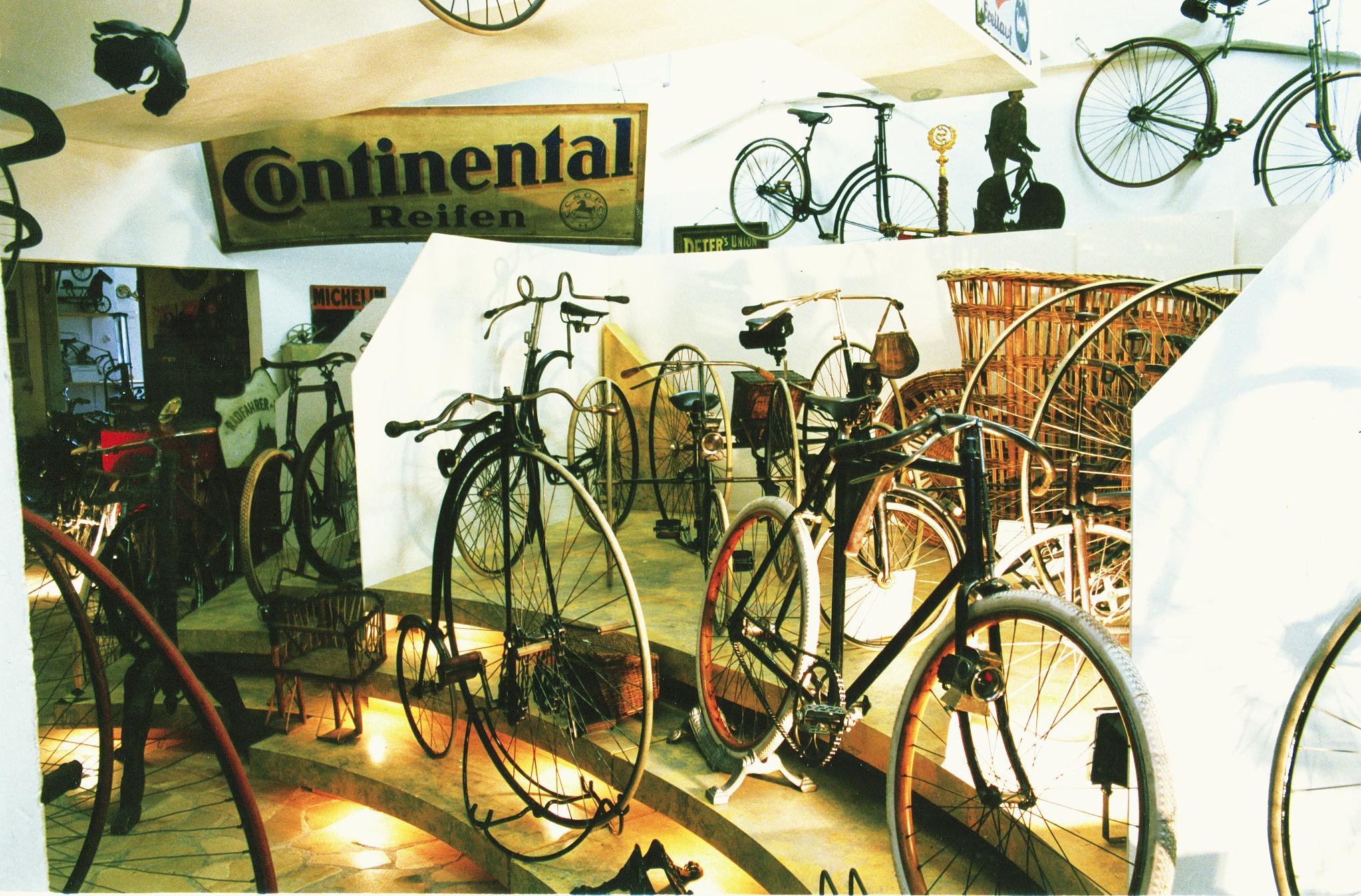 Deutsches Fahrradmuseum in Bad Brueckenau